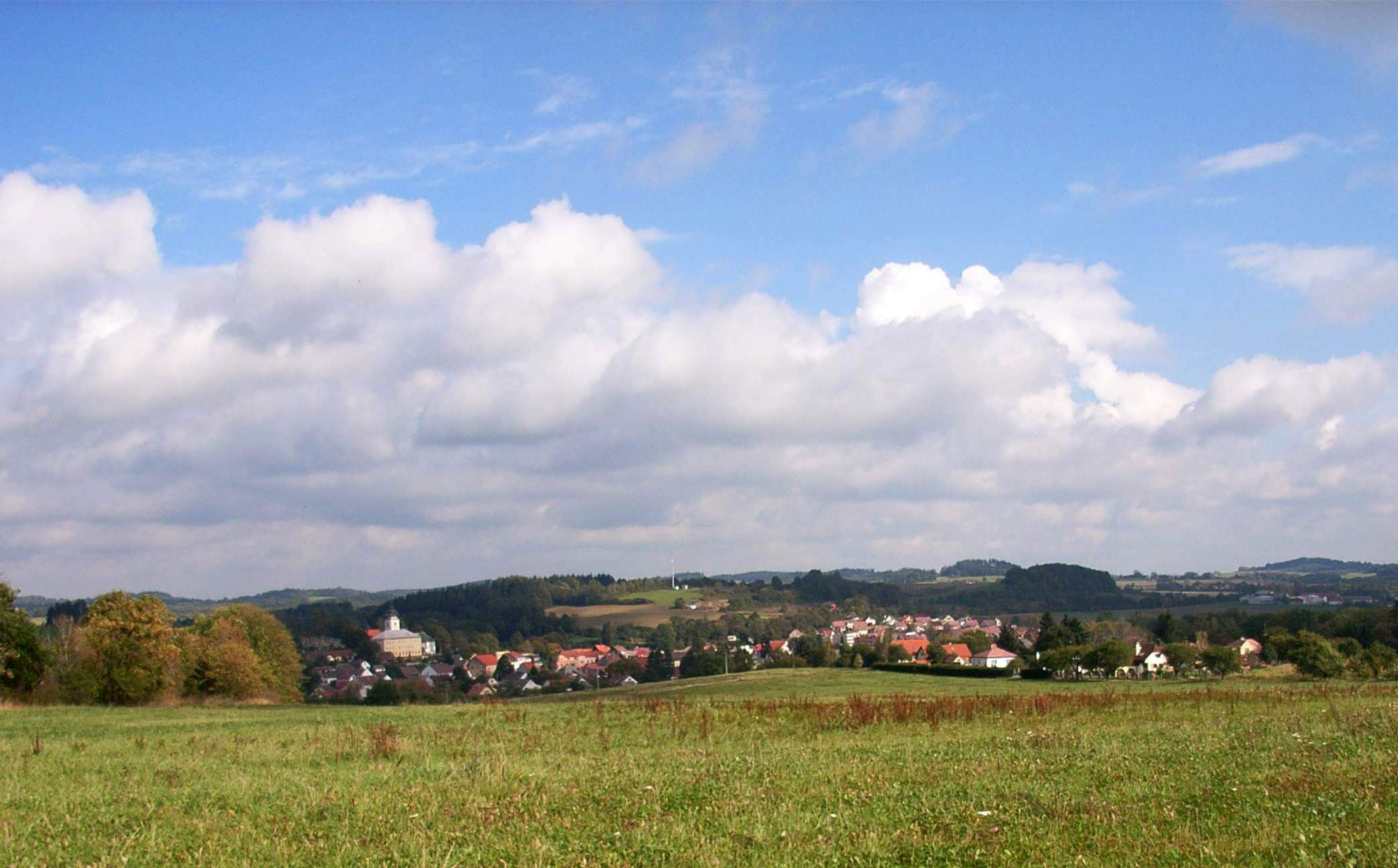 Jistebnice-pohled od západu-z vrchu "Hradiště"